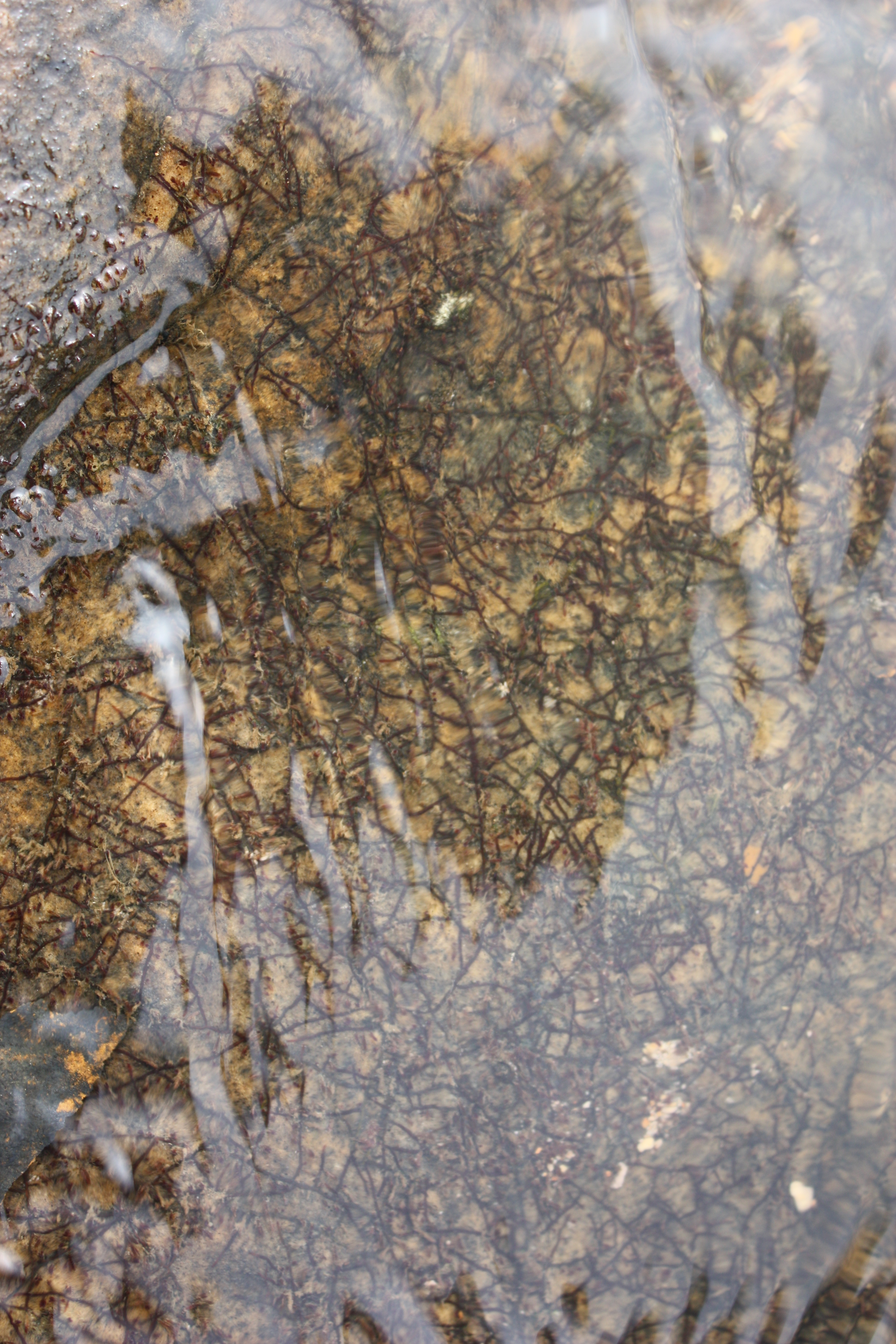 Tristicha trifaria in Cascades de Karfiguela, SW Burkina Faso